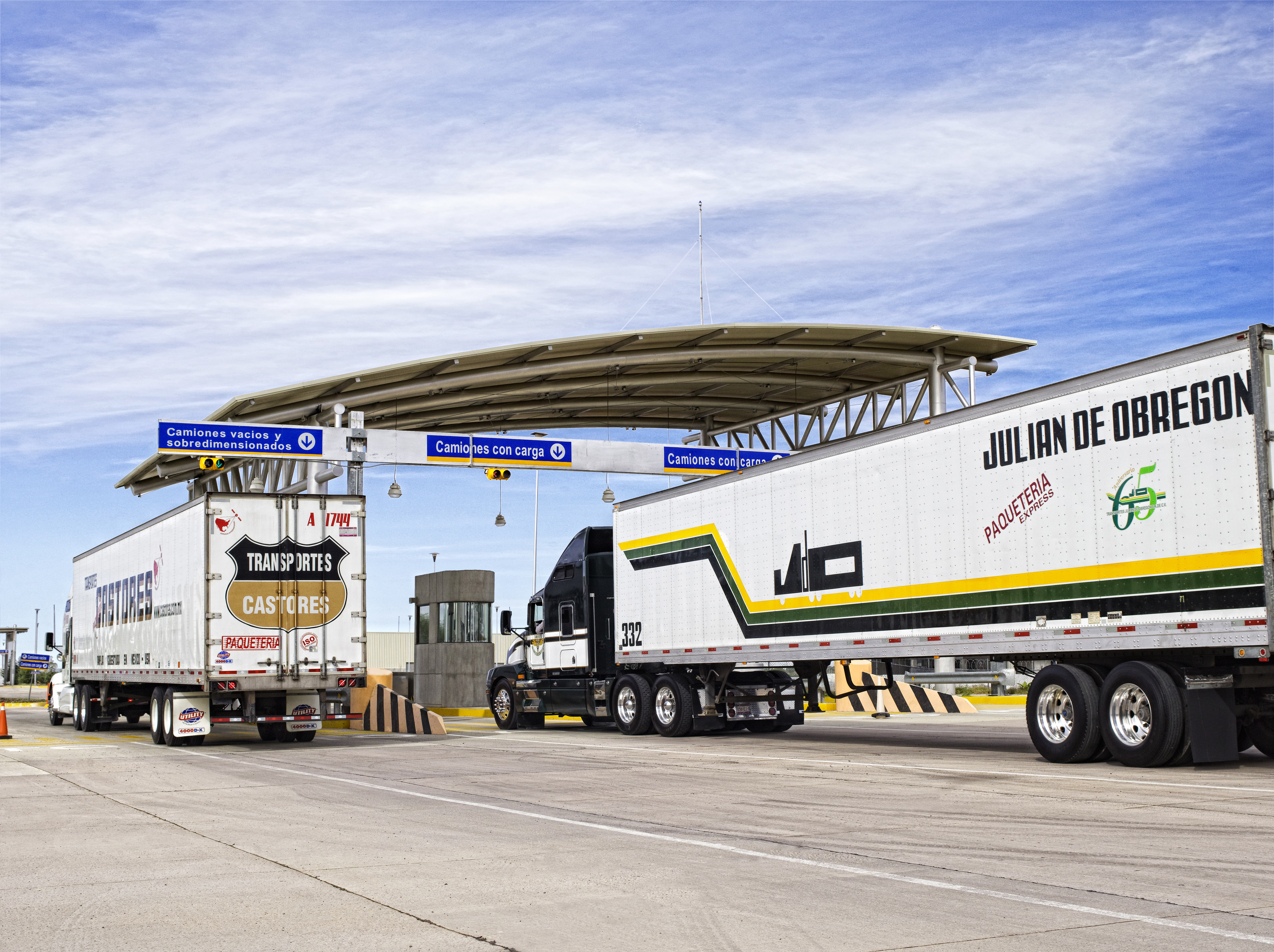 Primera foto de la aduana del Puerto Interior.